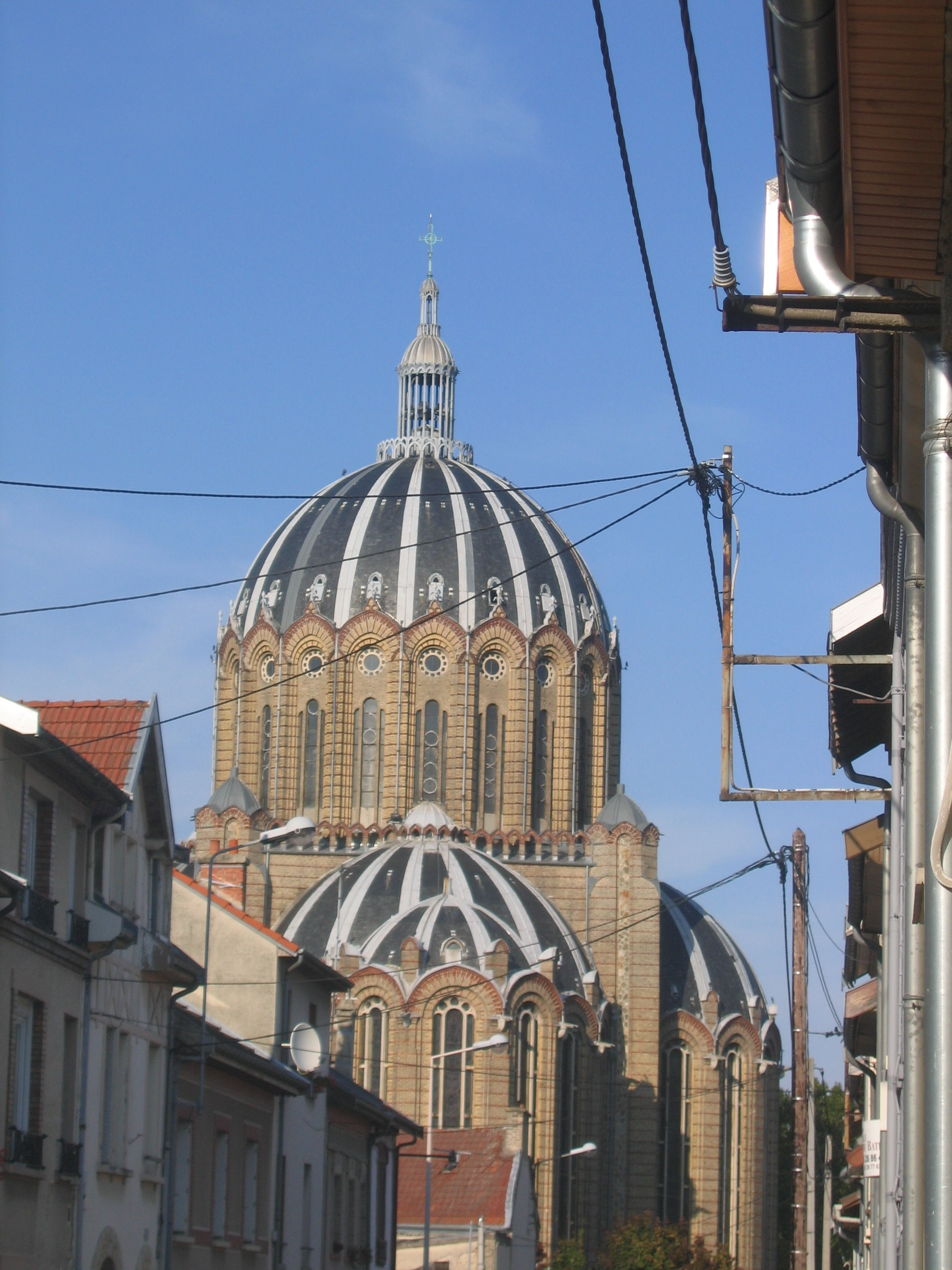 Vue de la basilique Sainte Clotilde, à Reims, depuis une rue du quartier Sainte Anne.